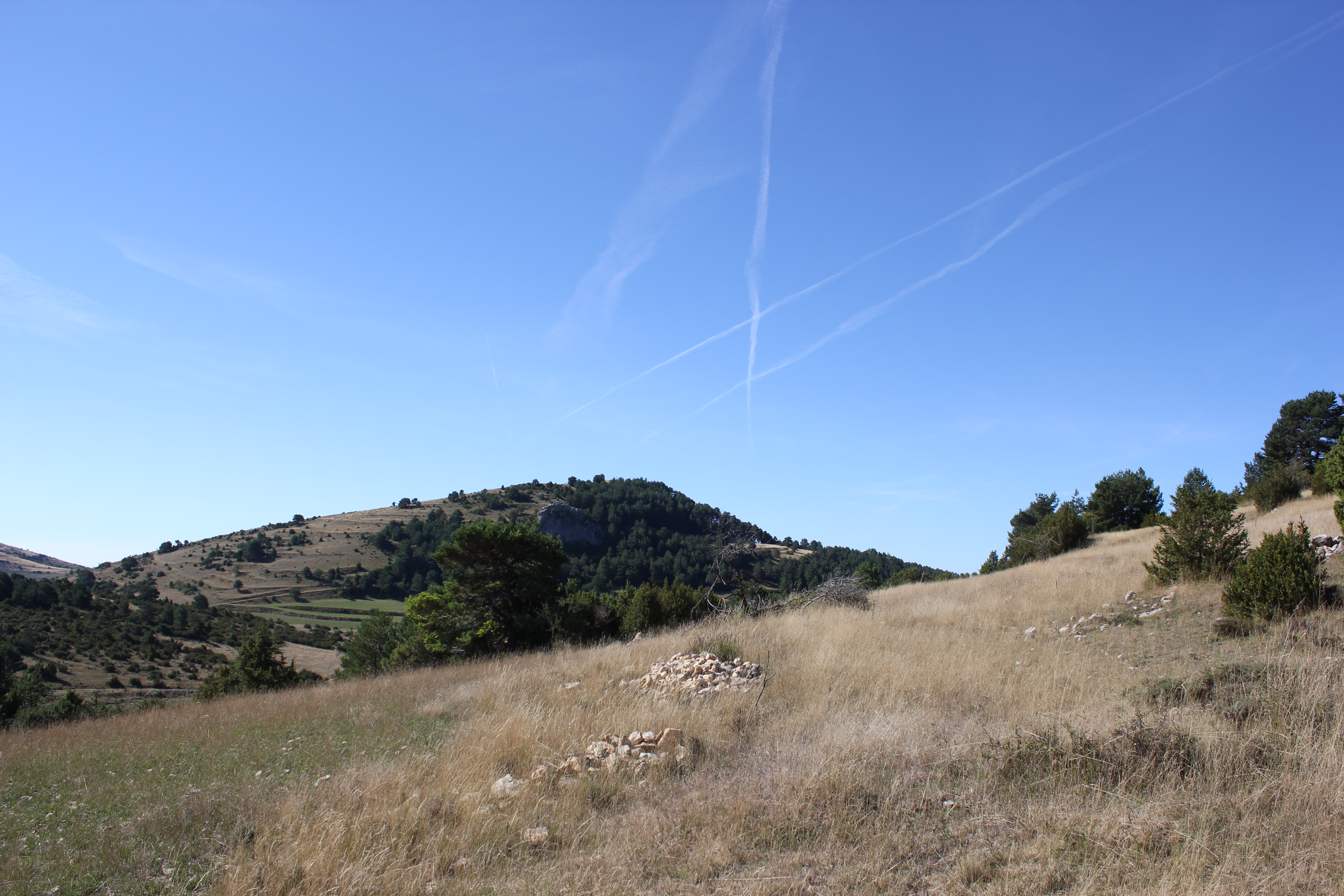 Tossal de la Pinyassa des dels camps del Tilló